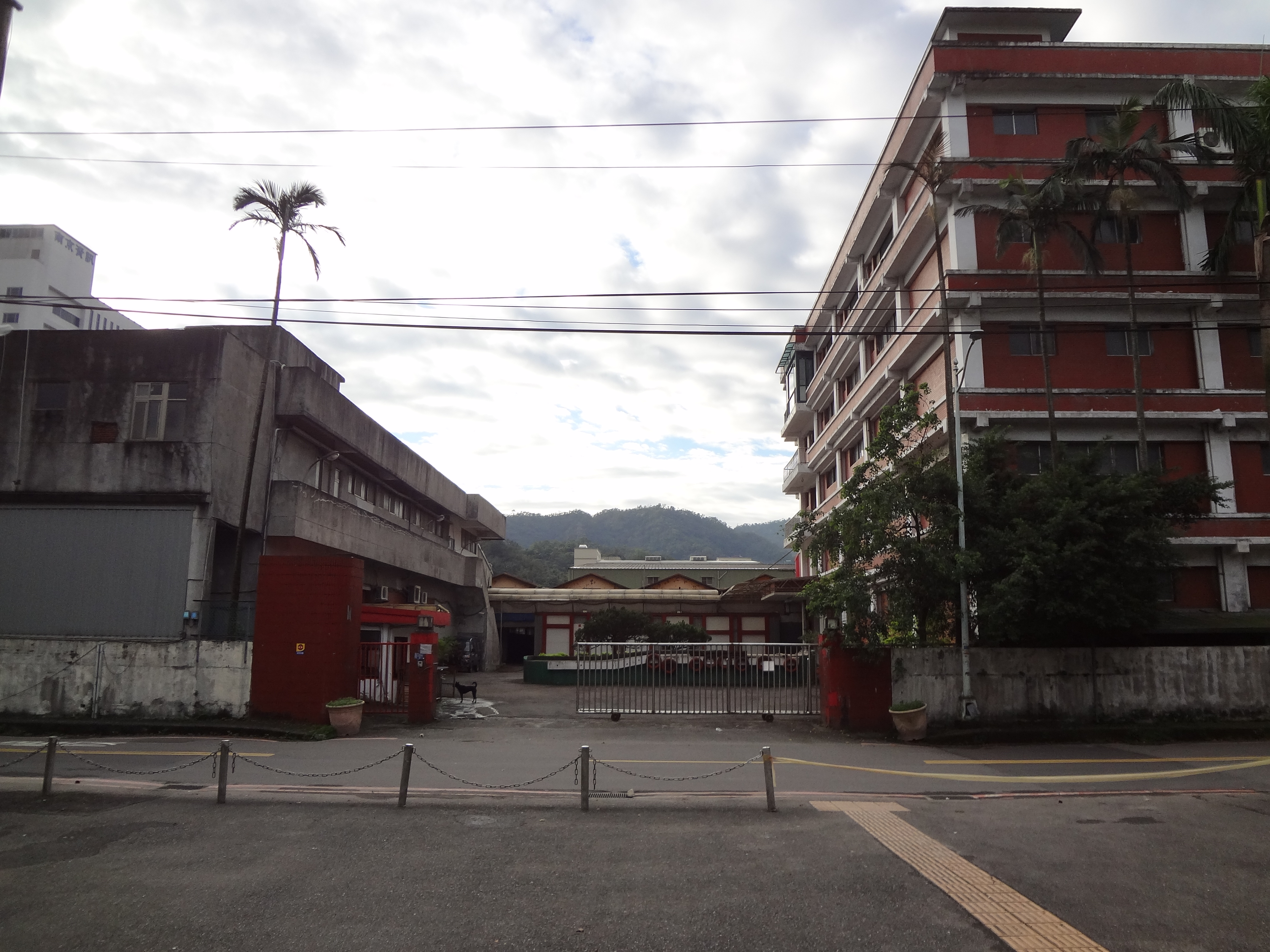 原義美食品六堵廠，位於基隆市七堵區工建北路2號，2007年2月喬聿貿易總部遷移至此。